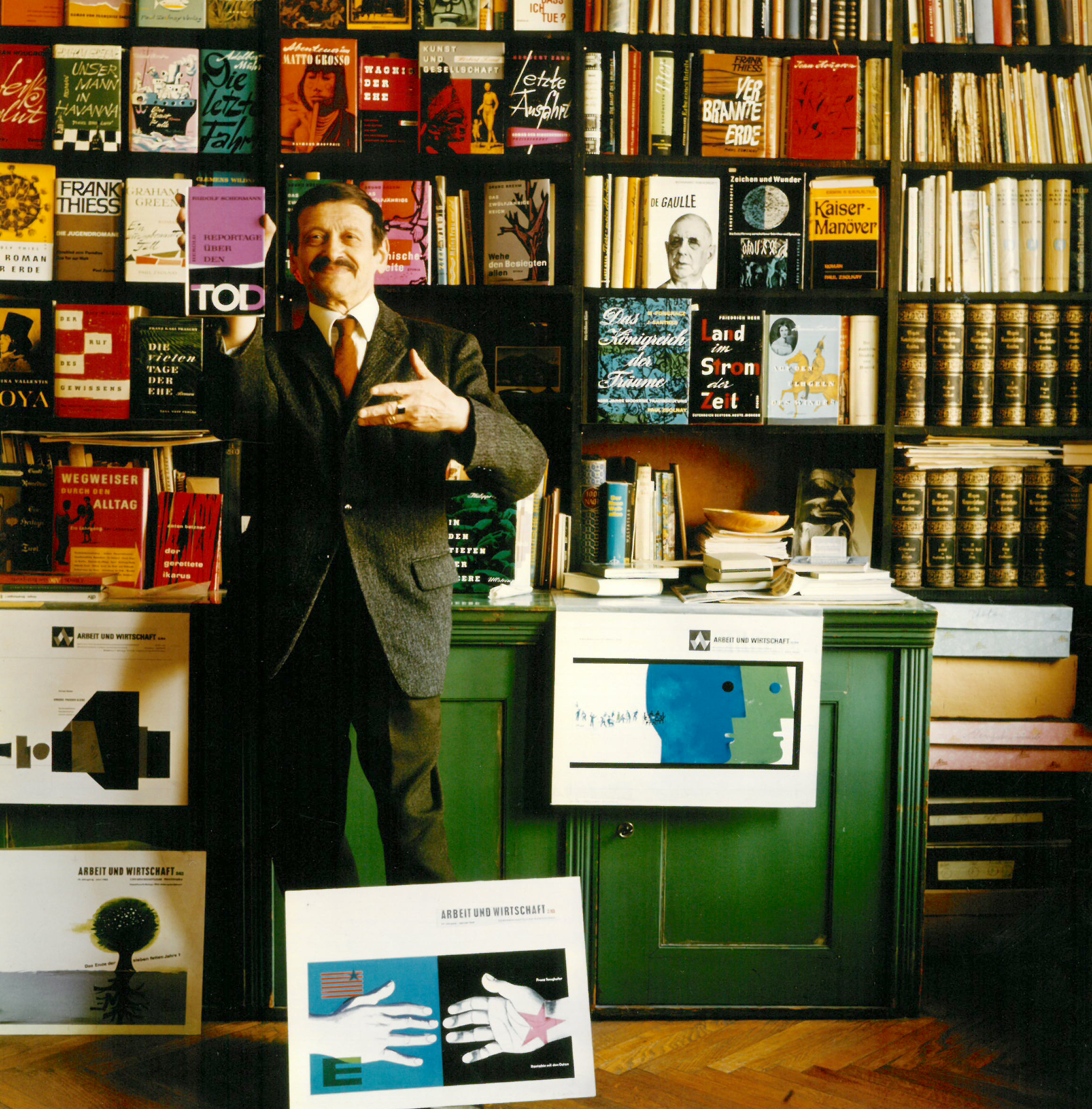 Ernst Paar vor seinen illustrierten Buchumschlägen